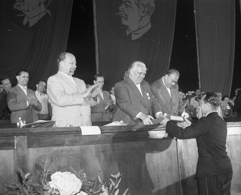 Berlin, Parteikonferenz der SED ADN-ZB/Heilig/10.7.1952/II. Parteikonferenz der SED vom 9.-12.7.1952 in der Werner-Seelenbinder-Halle Berlin: U.B.z.: Eine Delegation Bergarbeiter aus der Großkokerei Lauchhammer übergibt dem Vorsitzenden des ZK der SED Wilhelm Pieck eine Mappe mit Selbstverpflicht Abgebildete Personen: Pieck, Wilhelm: Präsident, Politbüro der SED, Vorsitzender der KPD, DDR (GND 118594273) Ulbricht, Walter: Staatsratsvorsitzender, Erster Sekretär des Zentralkomitees (ZK) der SED, Vorsitzender des Nationalen Verteidigungsrates, DDR (GND 118625179) Grotewohl, Otto: Ministerpräsident, stellvertretender Staatsratsvorsitzender, DDR (GND 118542680)